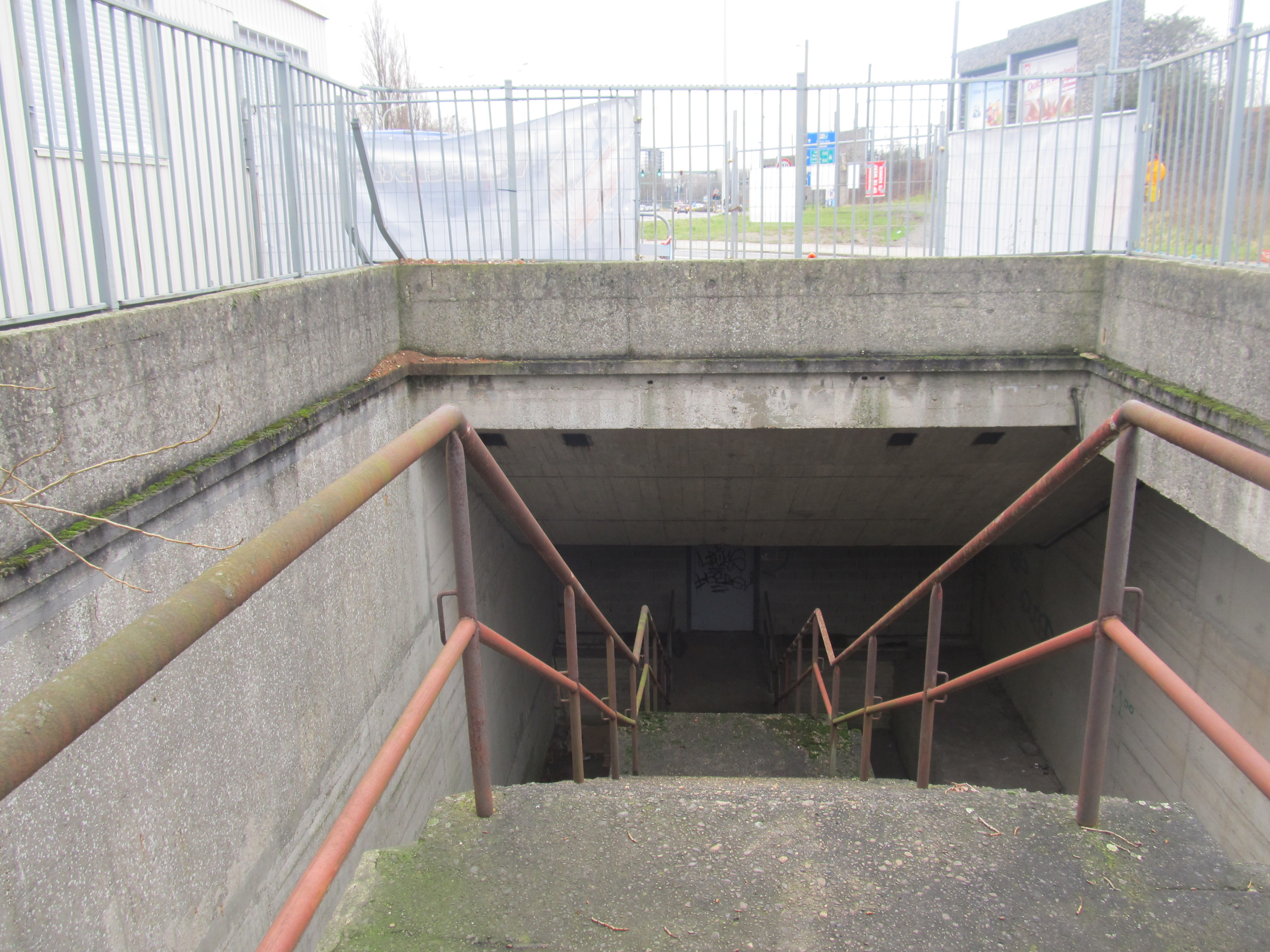 Gura de premetrou Foorplein. Stația nu se află în funcțiune.